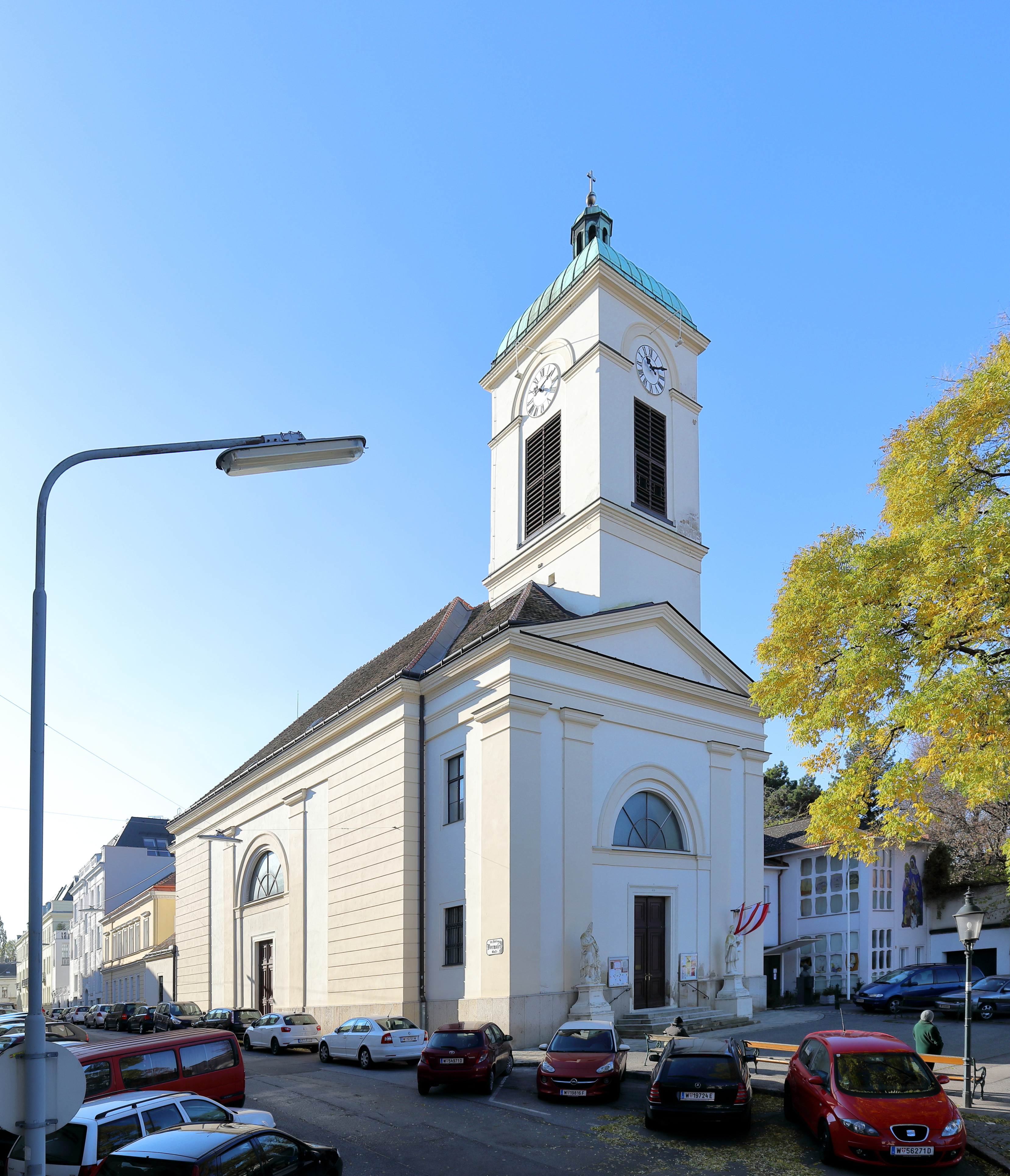 Nordostansicht der röm.-kath. Pfarrkirche hl. Paulus (Döblinger Pfarrkirche), im 19. Wiener Bezirk Döbling.Die Kirche mit kuppelgedecktem Fassadenturm wurde anstelle einer baufälligen Vorgängerkirche von 1826 bis 1829 durch Baumeister Josef Reininger in klassizistischen Formen errichtet. Vor der Kirche befinden sich Steinfiguren des hl. Erasmus (frühes 18. Jhdt.) und des hl. Johannes Nepomuk (um 1800).